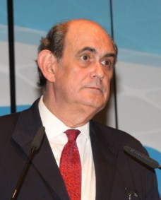 16 noviembre. Granados, Sardinero, Rosa Vindel e Ignacio Astarloa en Arganda del Rey